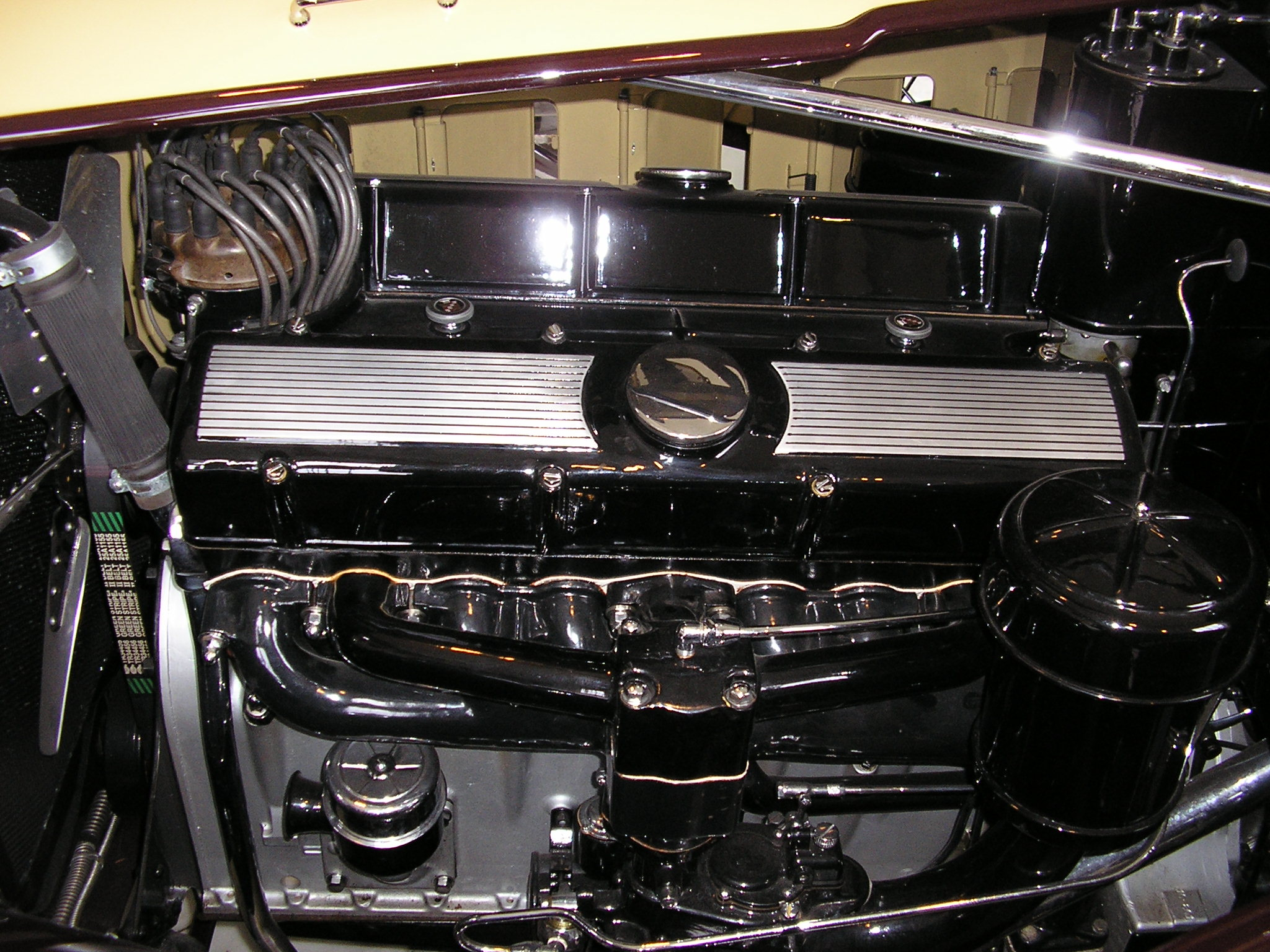 1931 Cadillac Series 370 A Coupé V12